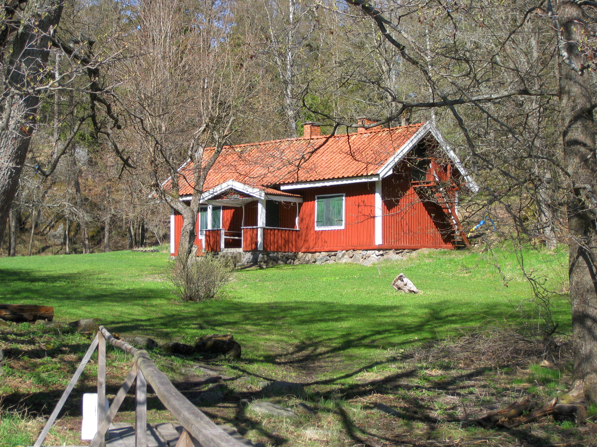 Charlottendal, Huddinge, södra Stockholm